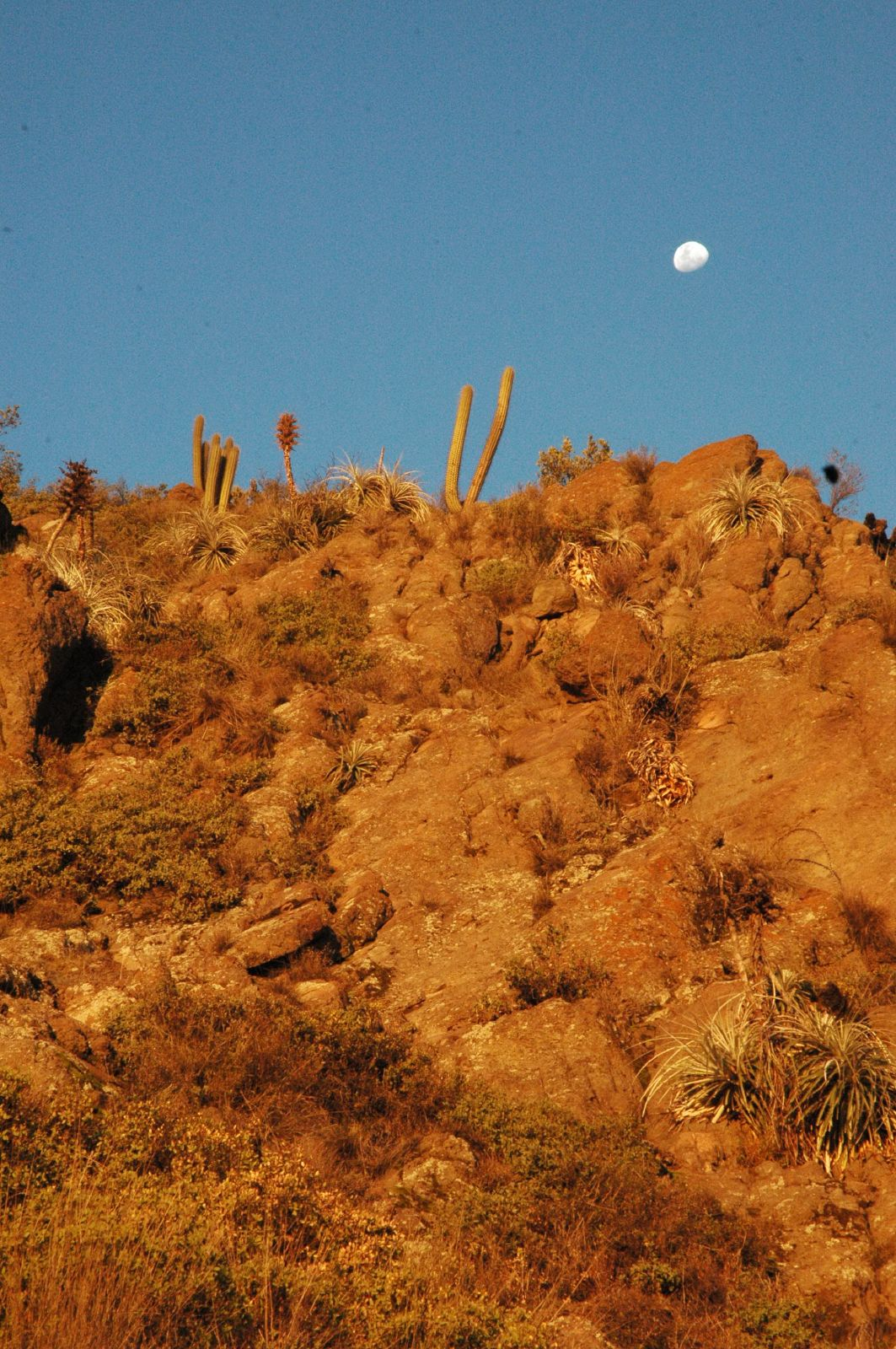 vista desde el cerro Pochoco